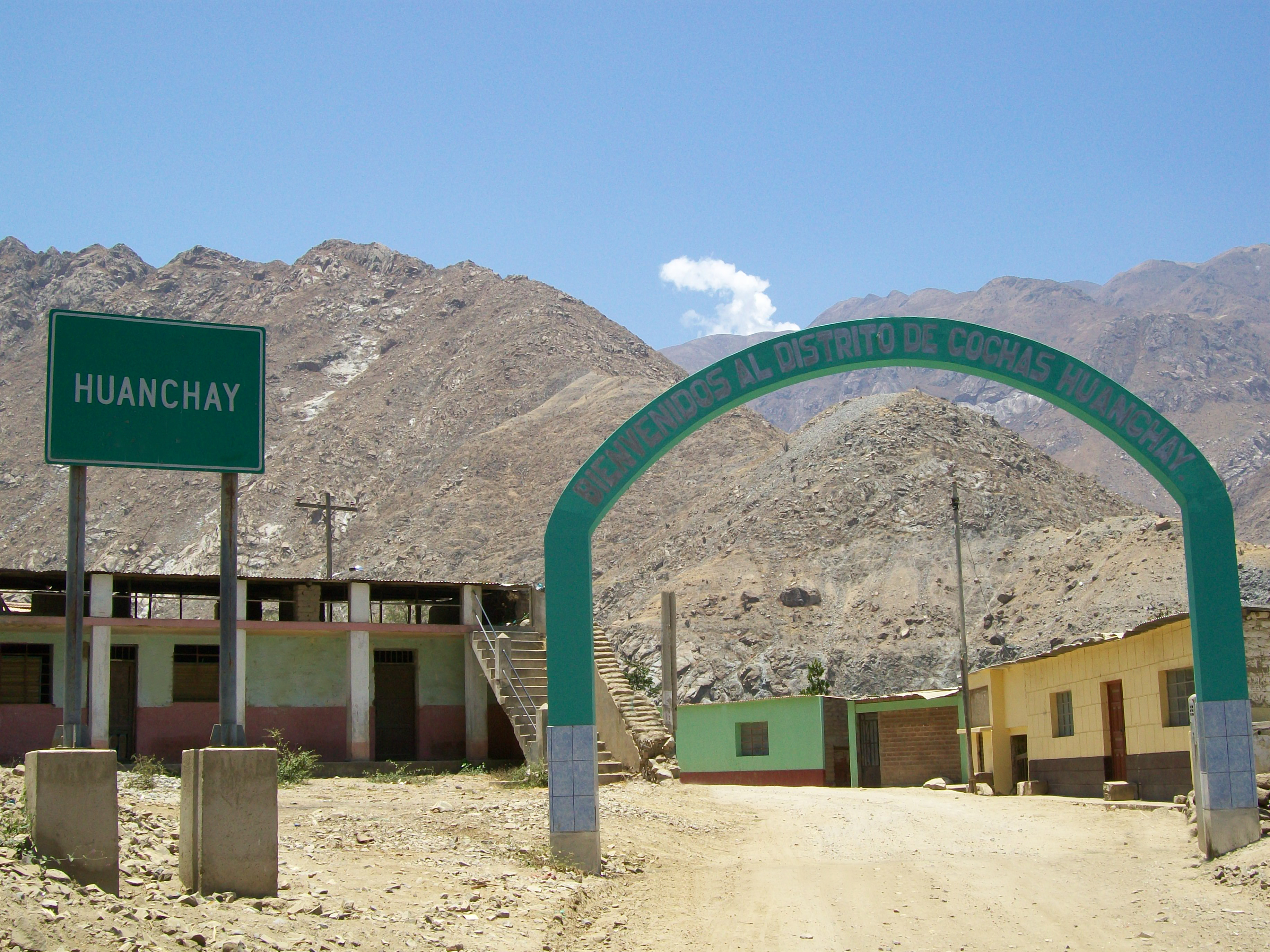 La entrada de la Ciudad de Huanchay